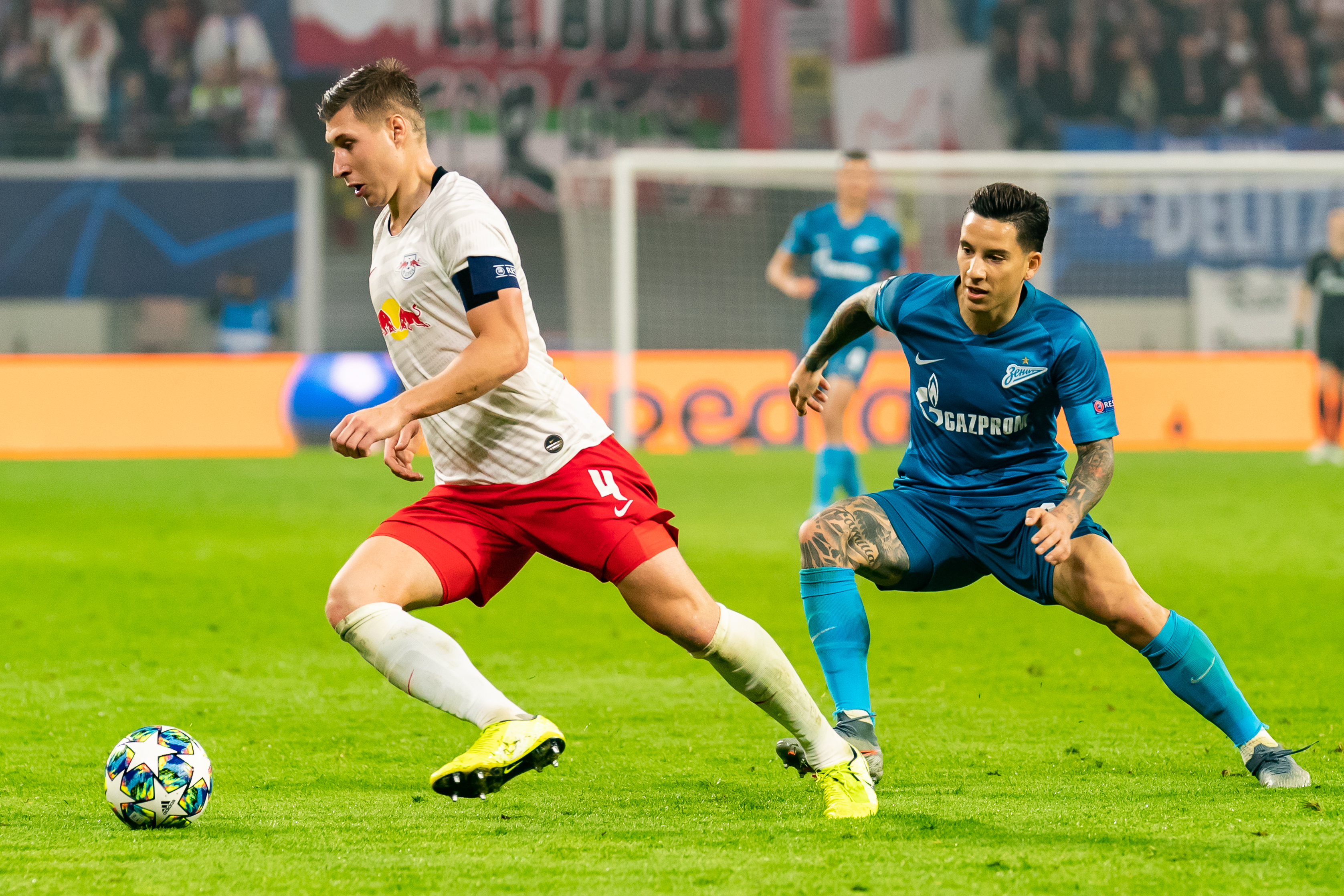 Fußball, Männer, UEFA Champions League, RB Leipzig - FC Zenit St. Petersburg; v.li.: Willi Orban (RB Leipzig, 4), Sebastian Driussi (Себастьян Дриусси, Zenit St. Petersburg, 11); Zweikampf, Duell, Aktion, action